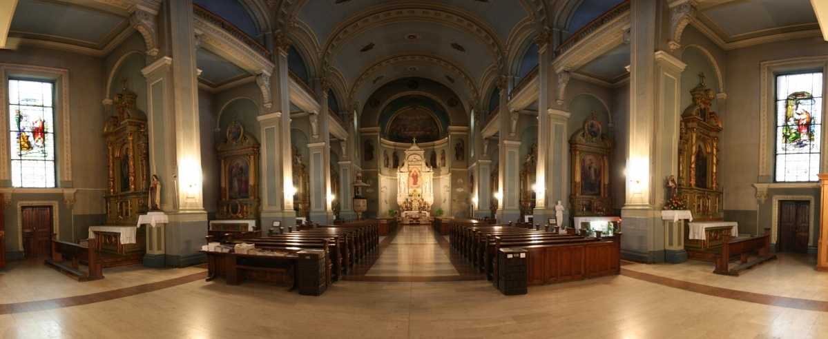 Unutrašnjost Bazilike Srca Isusovog u Zagrebu